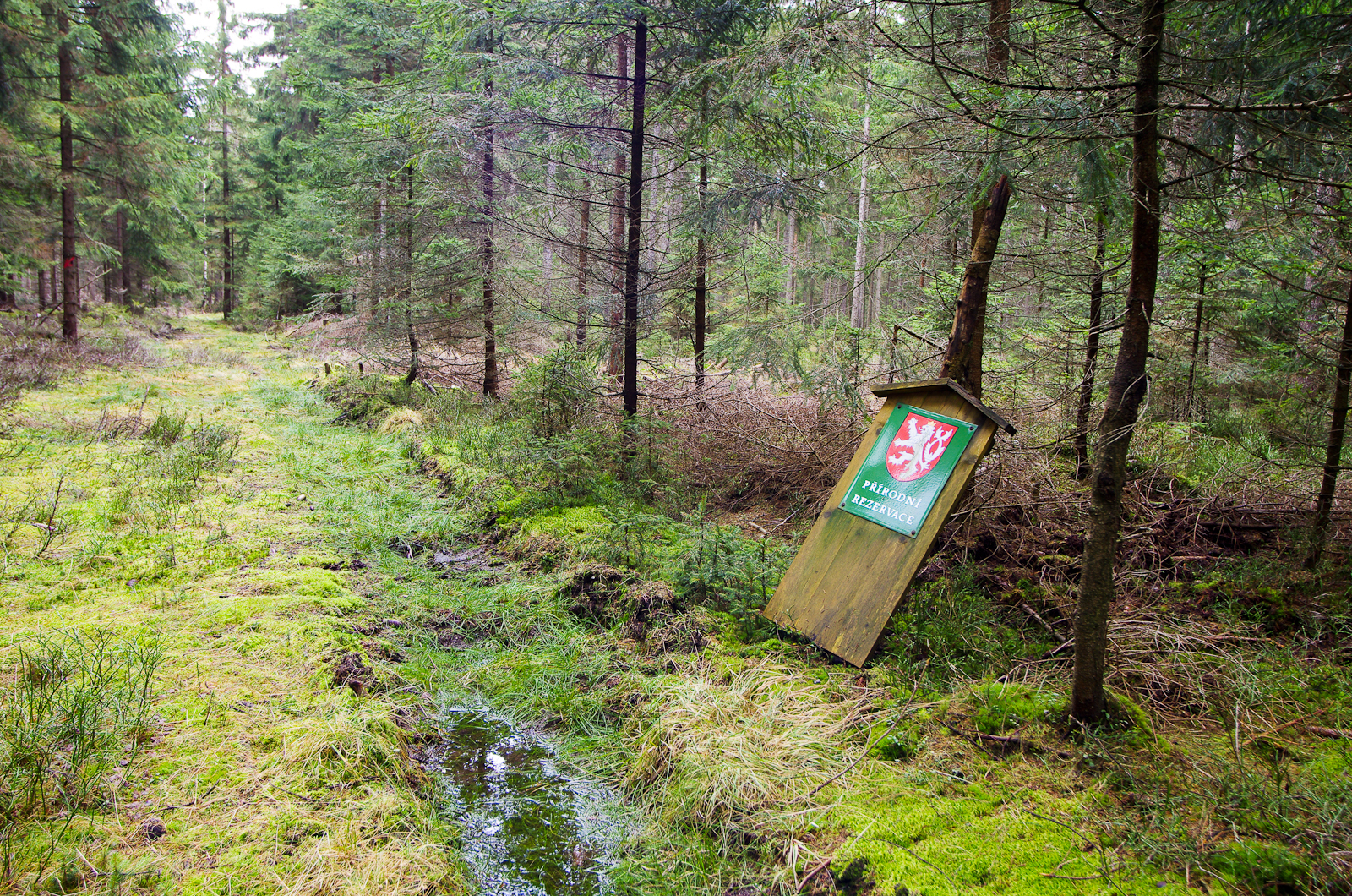 Přírodní rezervace "V rašelinách" v lesích nad obcí Horní Studenec u Oloví, v Přírodním parku Leopoldovy Hamry, Krušné hory, okres Sokolov